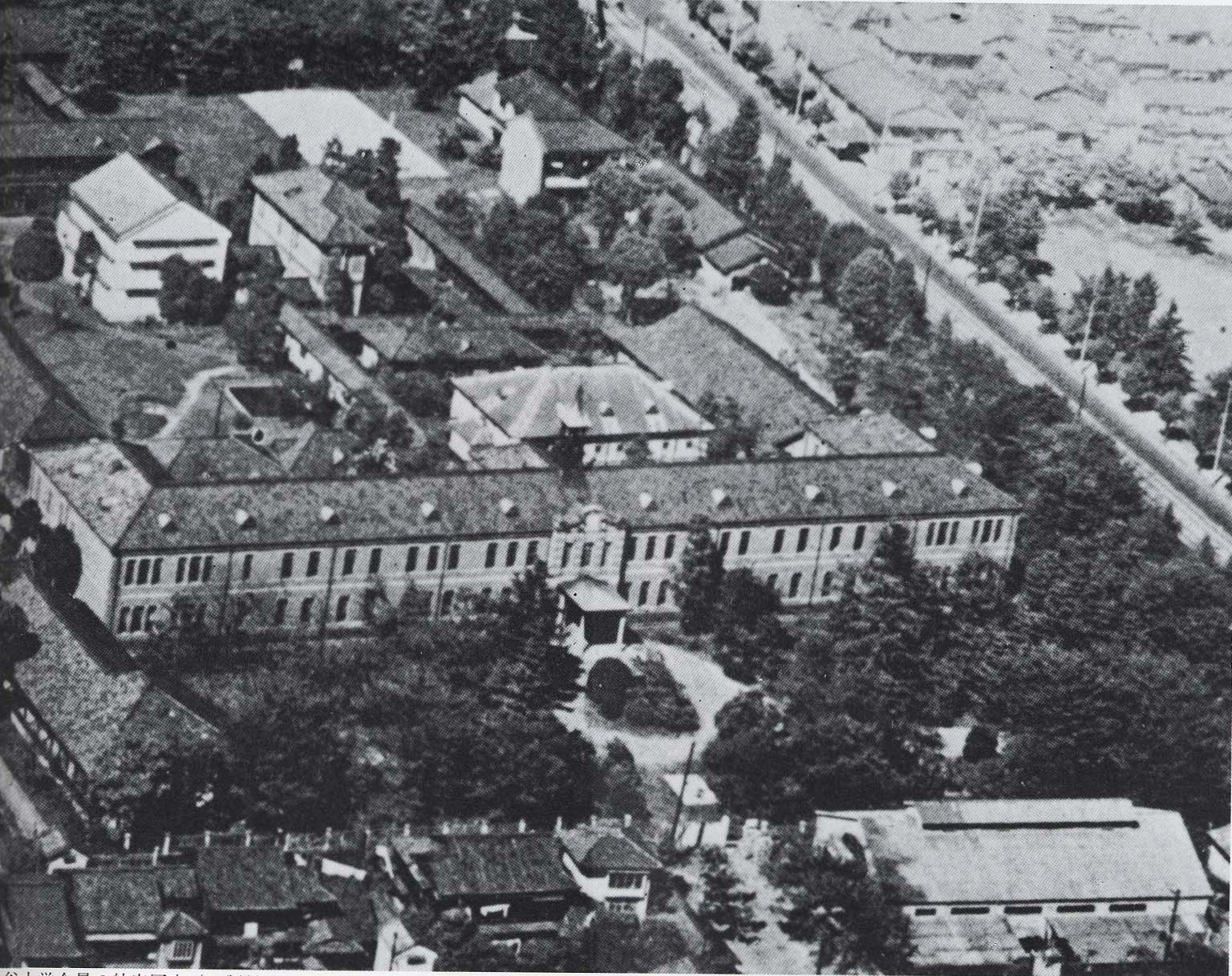 大谷大学全景の航空写真